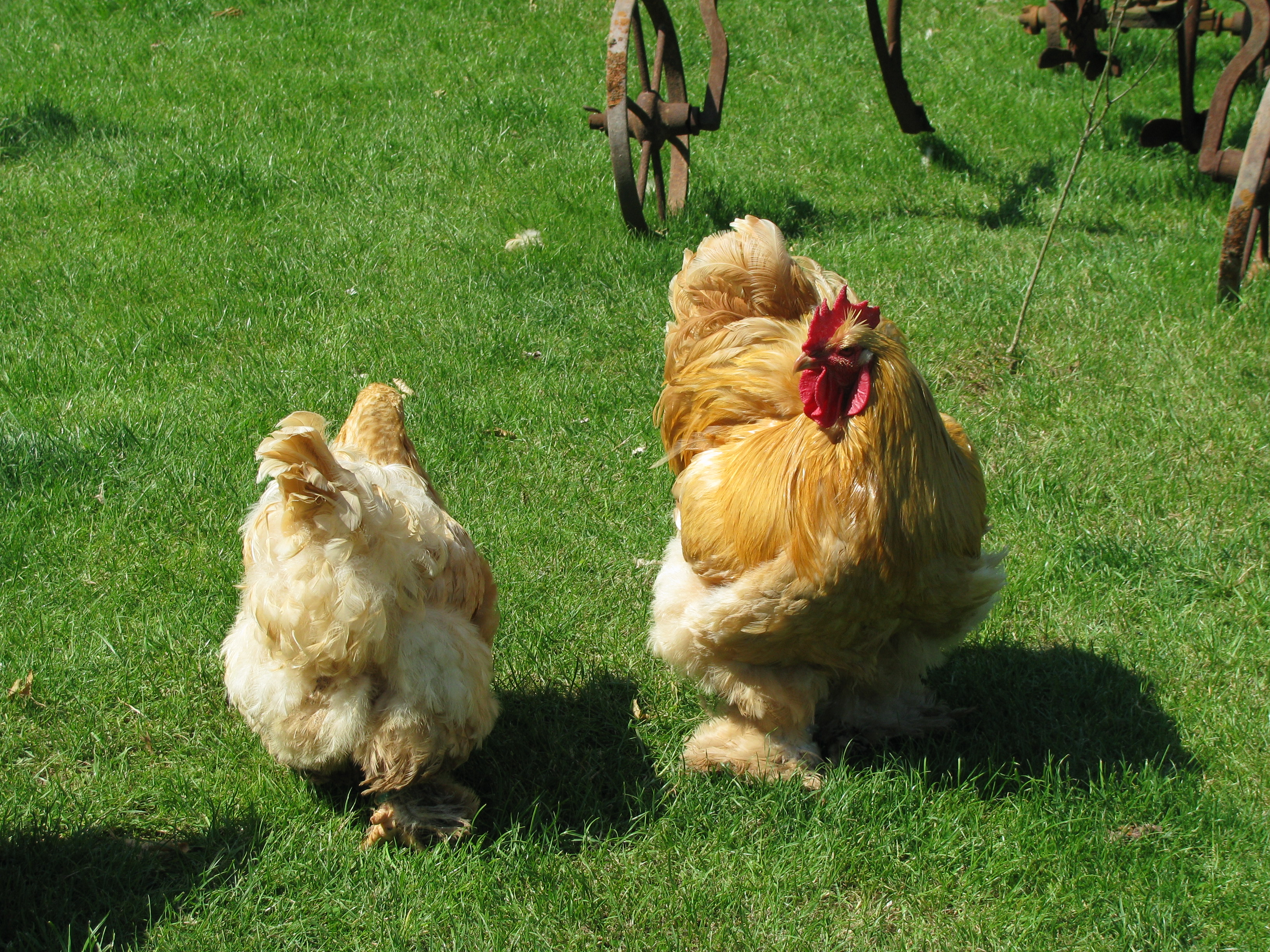 Chochin-Hühner, fotographiert im Wissenschaftlichen Geflügelhof Sinsteden